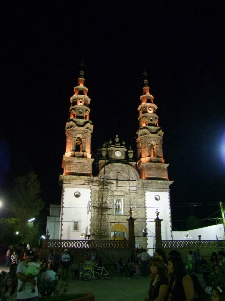 Ecuandureo,Michoacan